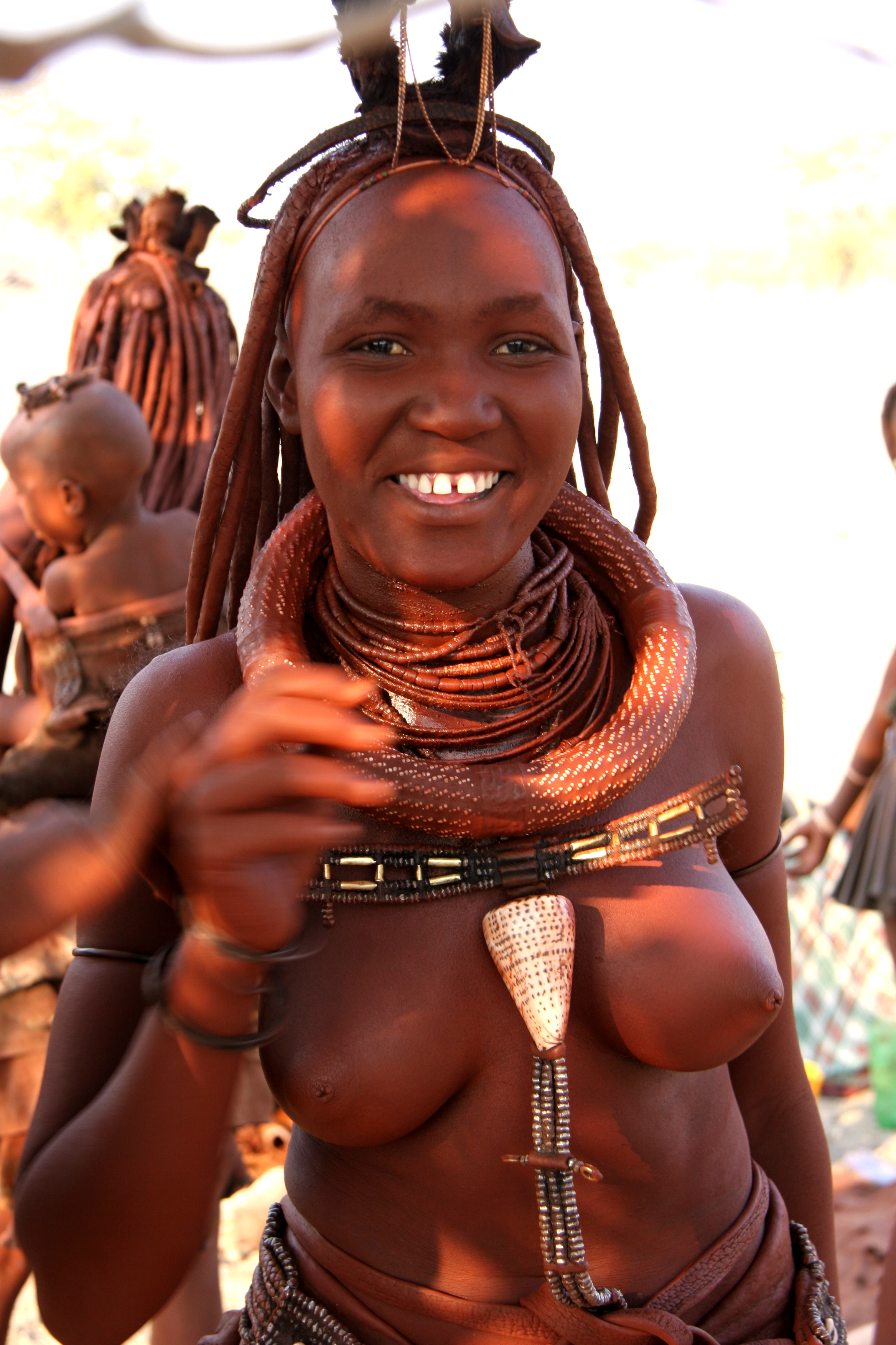 Namibie, femme himba, les himba se font enlever les deux incisives centrales du bas